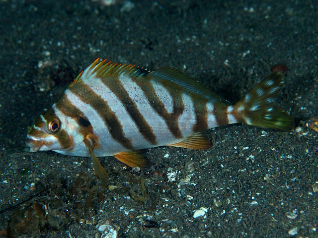 タカノハダイ Goniistius zonatus